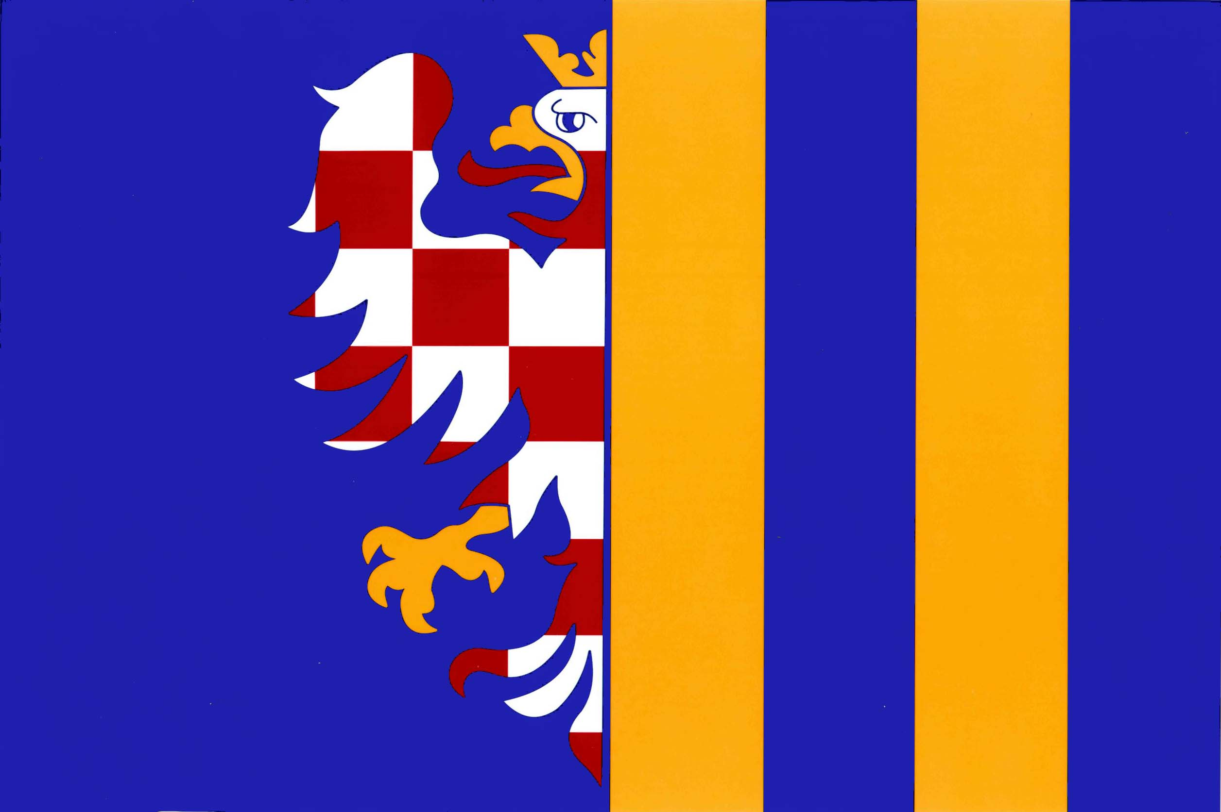 Vlajka obce Veverská Bítýška